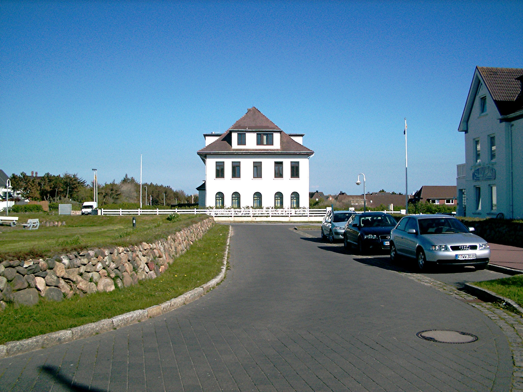 Ort: Wenningstedt auf der Insel Sylt. Das „KaiFU"-Schullandheim wird gemeinsam vom Helene-Lange-Gymnasium und dem Gymnasium Kaiser-Friedrich-Ufer (KaiFU - beide in Hamburg) betrieben. (13. Mai 2005) Ersteller: Benutzer:John N.